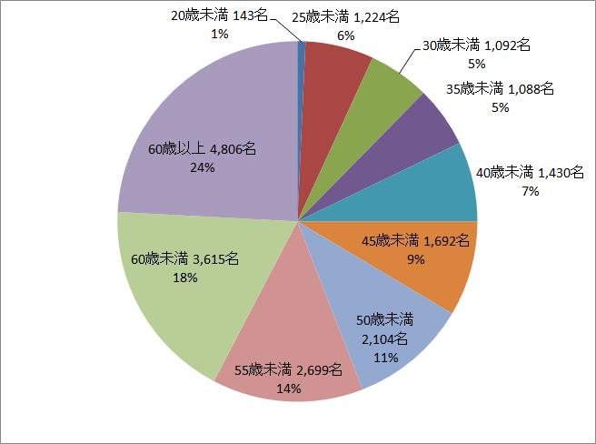 内航船員年齢構成